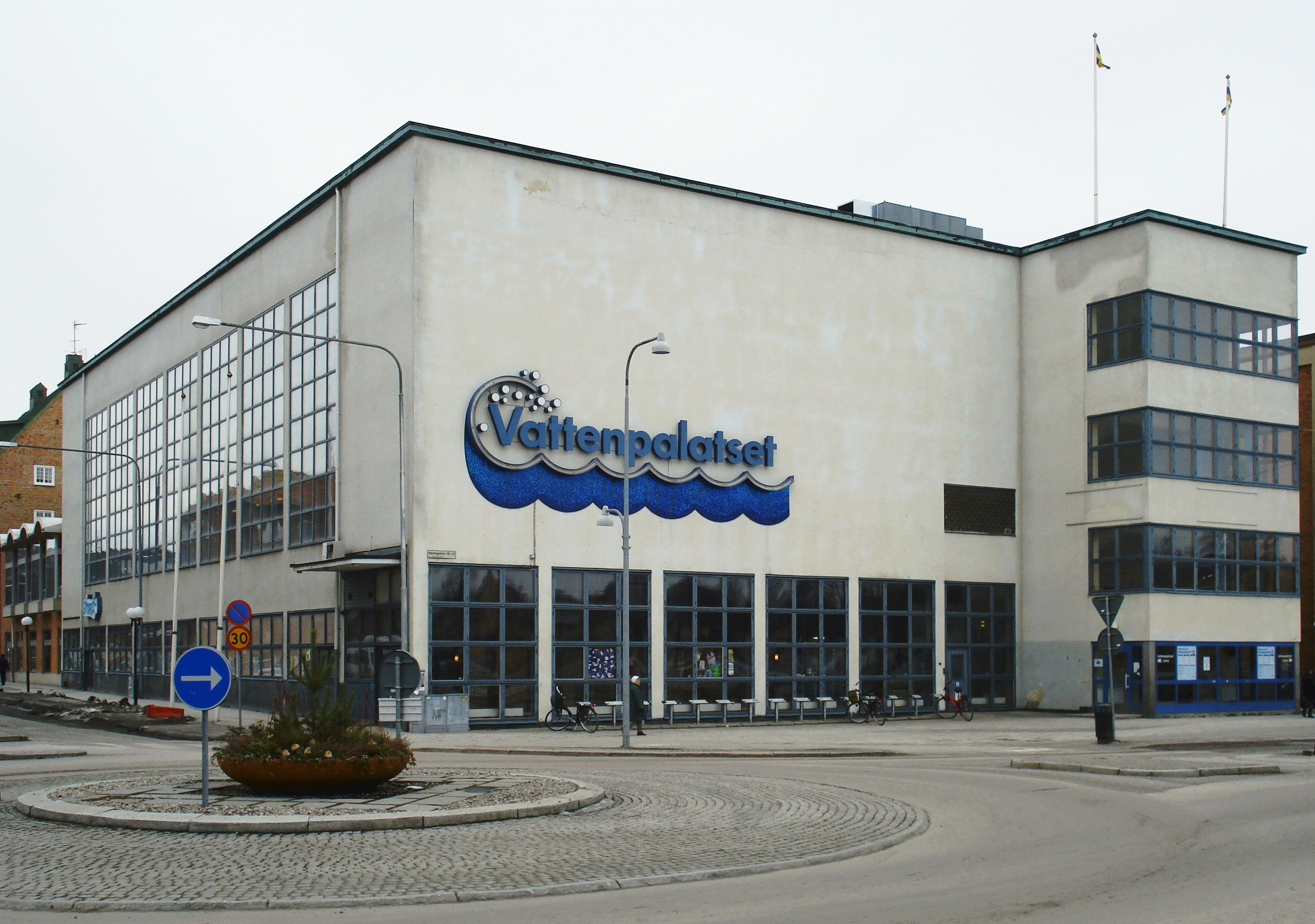 Bild på badhuset Vattenpalatset i Eskilstuna. Tagen från hamngatan.